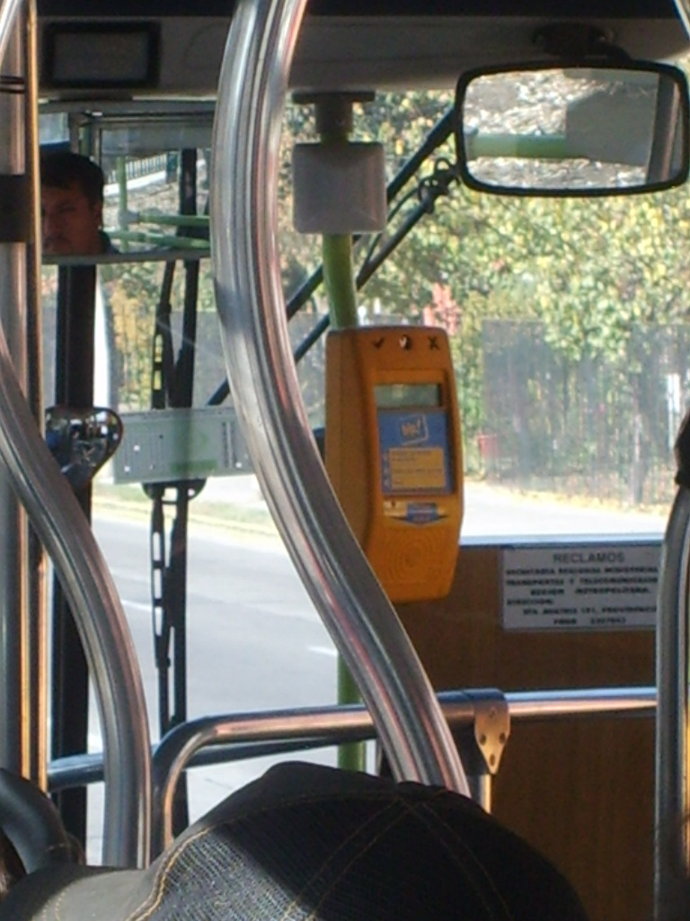 Fotografía de un validador del sistema Transantiago que se encuentra en los buses del sistema. Debido al lugar donde obtuve esta fotografía, no se nota bien los detalles.